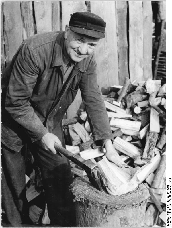 Cottbus, Westflüchtling beim Holzhacken Zentralbild Schutt 29.11.1954 "Ich habe vom Westen die Nase voll" Der Rentner Karl Reier verließ im Dezember 1953 seine Heimatstadt Cottbus und seine Familie und ging nach Westdeutschland in das kleine Dorf Scheitchen, Kreis Prüm (Eifel). Später kam er in ein Kloster nach Wachsweiler. Er erhielt im Monat 12 DM. Arbeit war für den 69jährigen nicht zu haben. Karl Reier hat es bitter bereut und kam nun wieder zurück nach Cottbus. Er arbeitet hier in einer Holzgroßhandlung. "Im Westen war ich nichts wert, ich war verachtet. Hier habe ich meine Familie, meine Heimat und meinen Verdienst". UBz: Karl Reier in der Holzhandlung Paul Neumann in Cottbus.